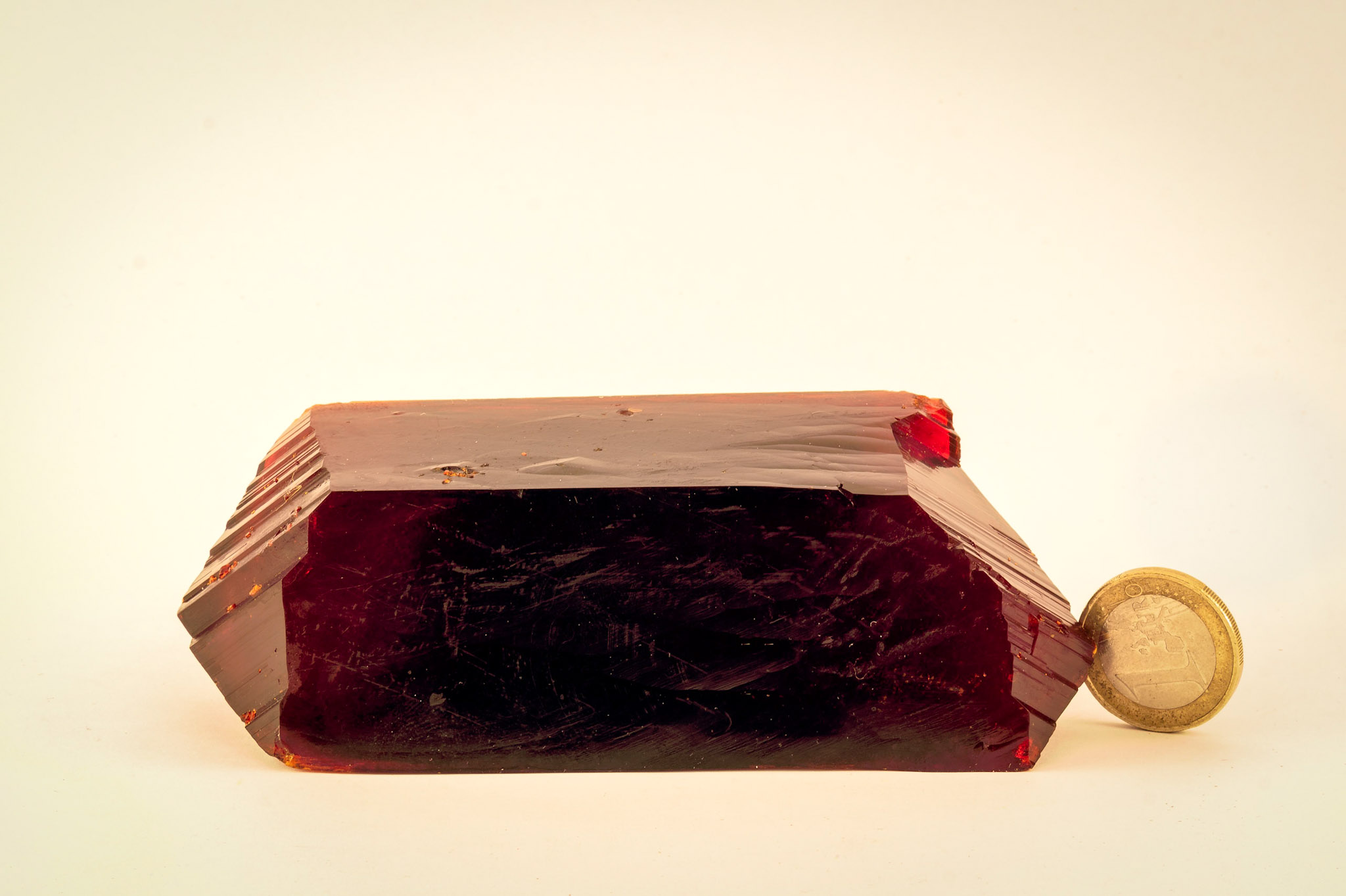 Kaliumhexacyanidoferrat(III) - Einkristall 258,9 g , ca. 1/2 Jahre gewachsen